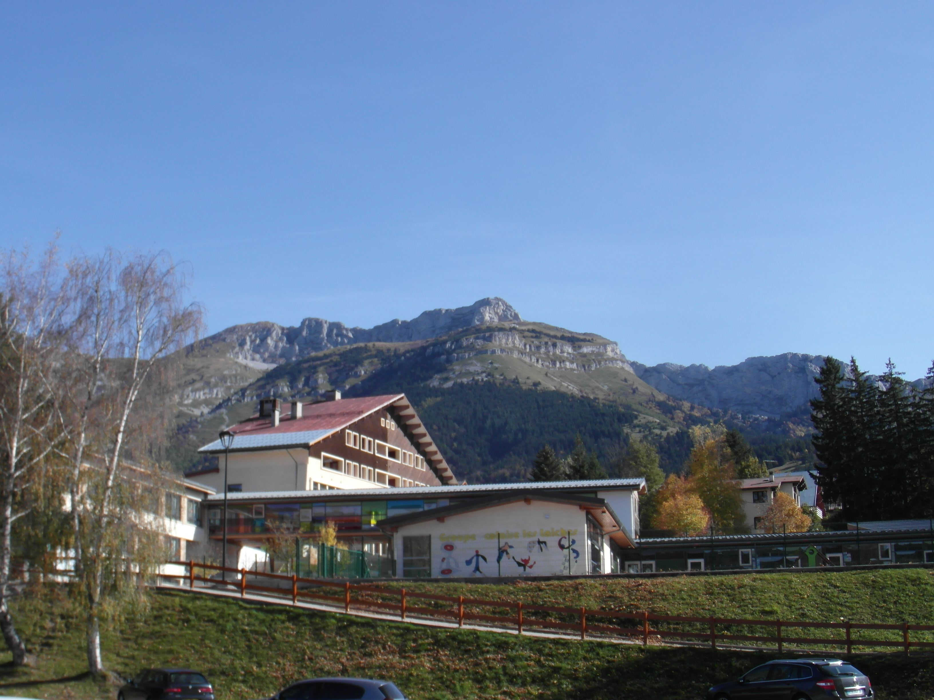 Mount Cornafion